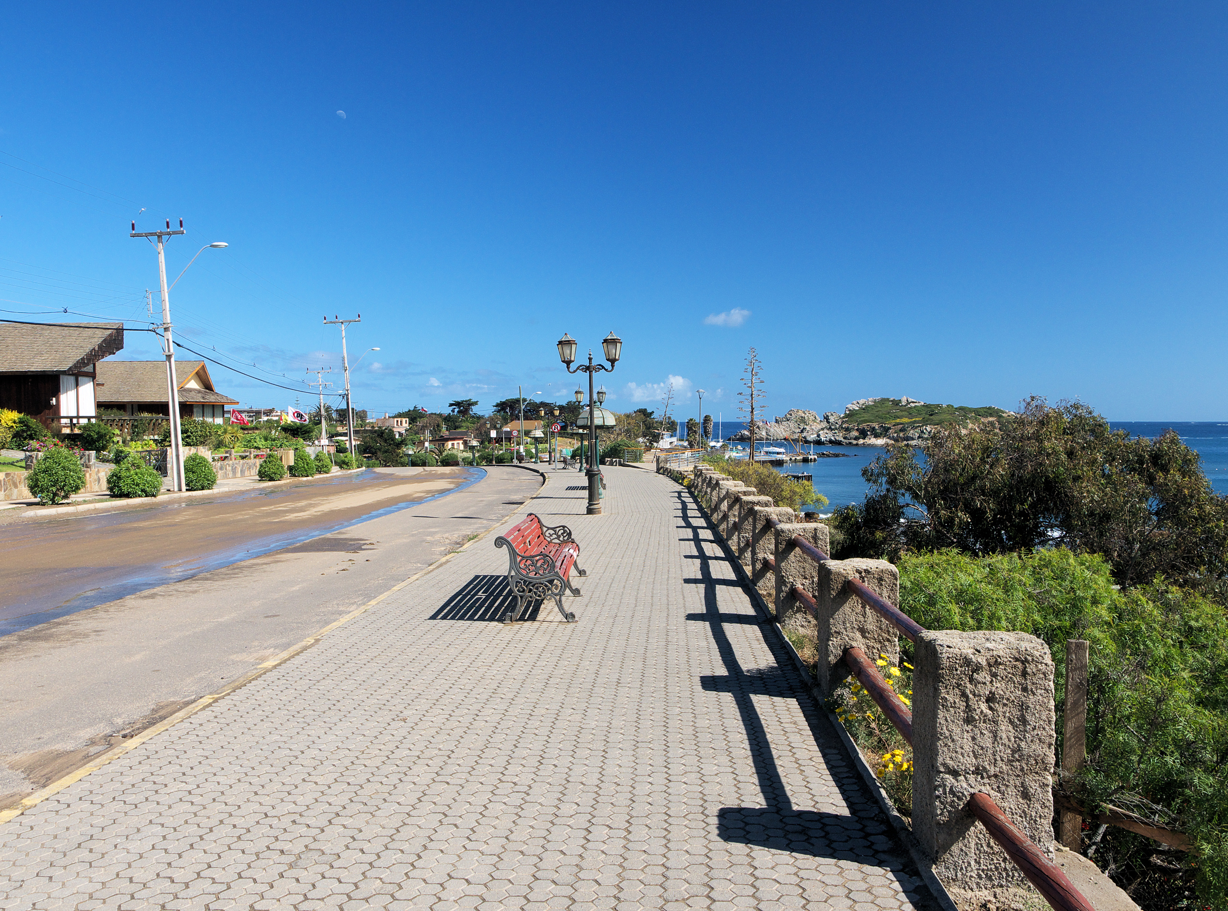 Paseo marítimo en Pichidangui